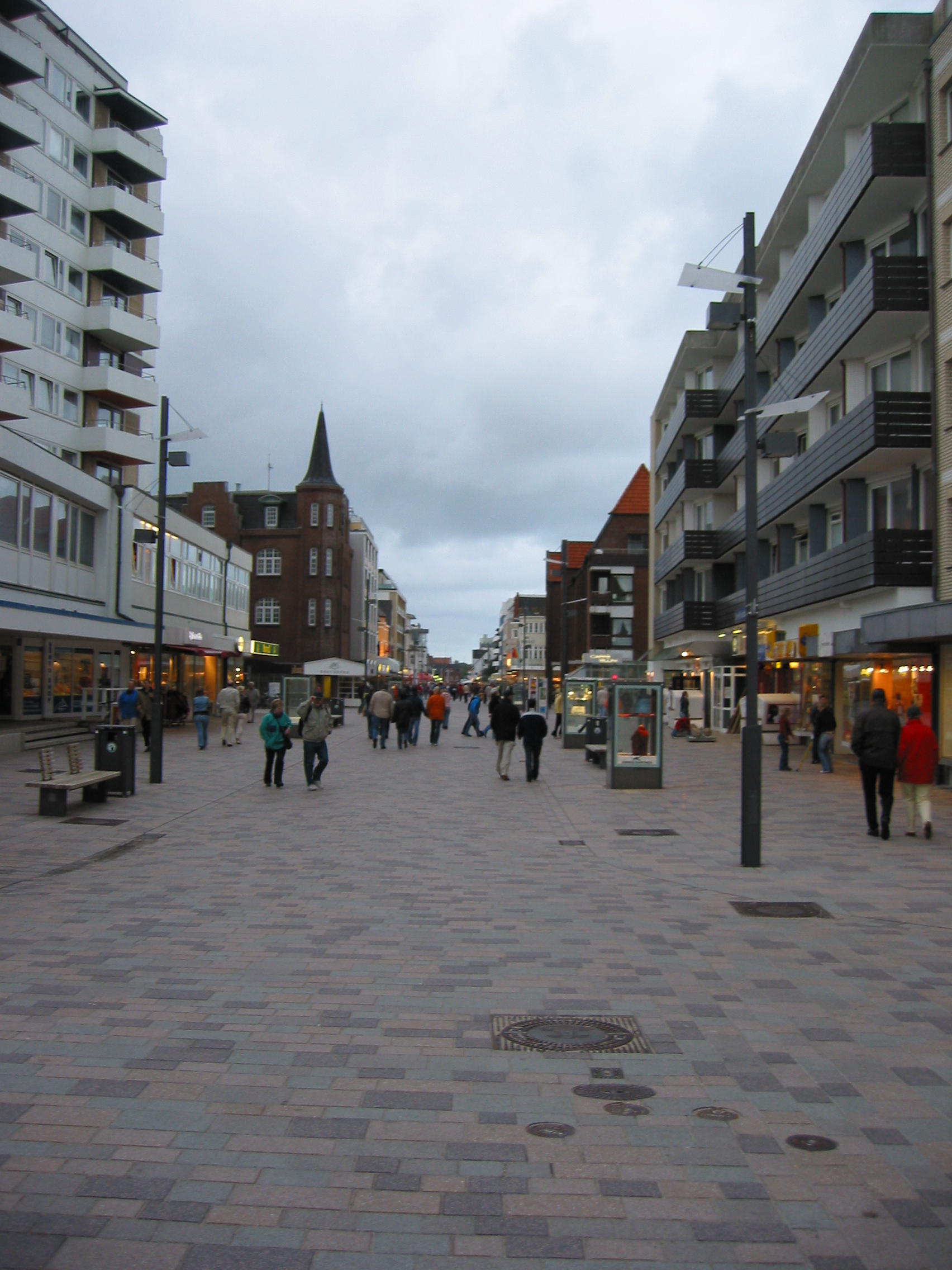 Westerland Friederichstrasse